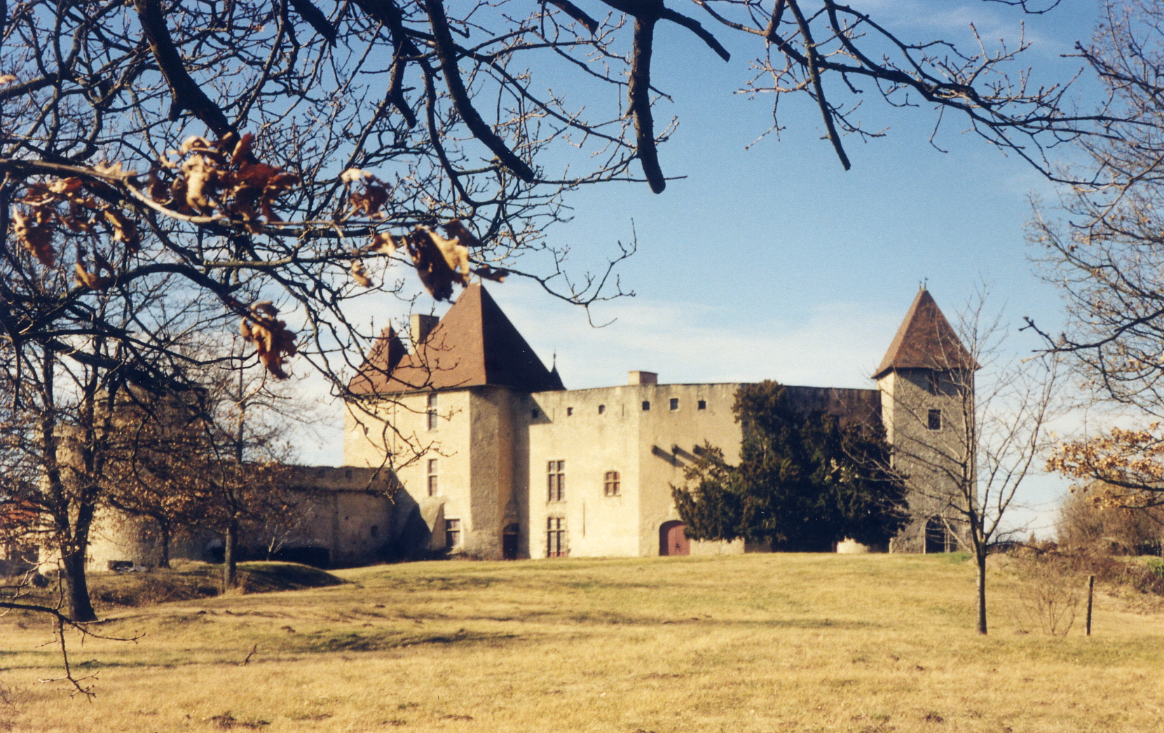 Château de La Roche (InscritClassé) .